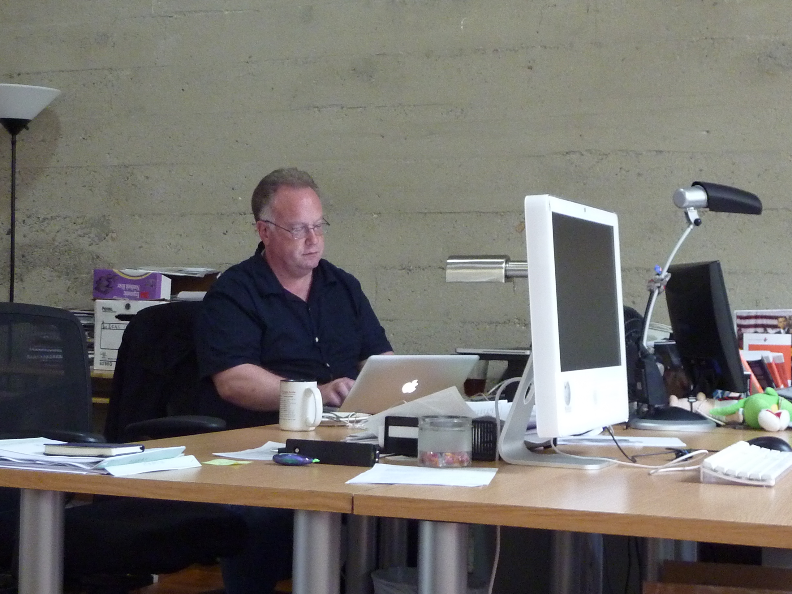 Mike Godwin